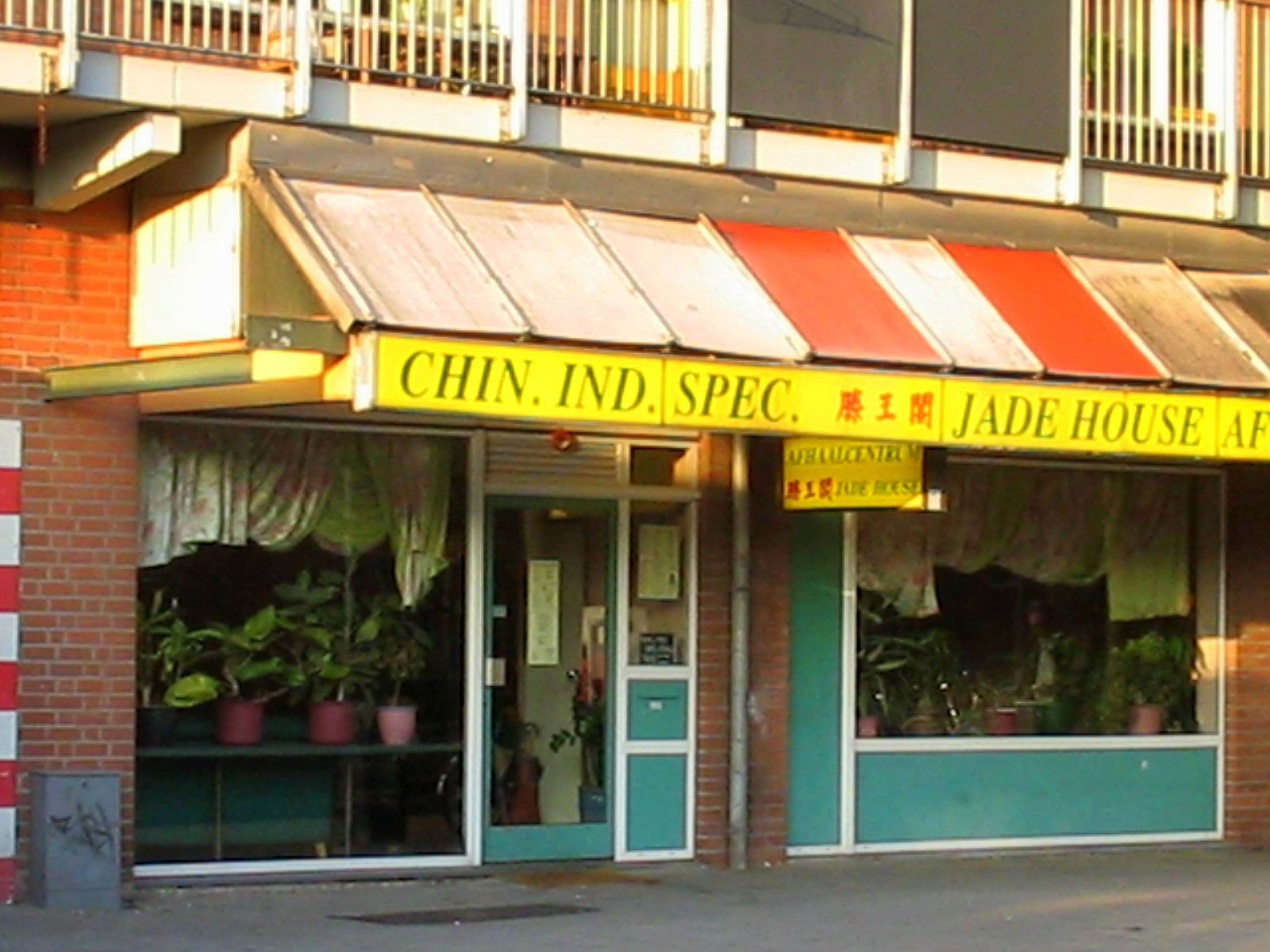 Chinees-Indisch afhaalrestaurant, Delft